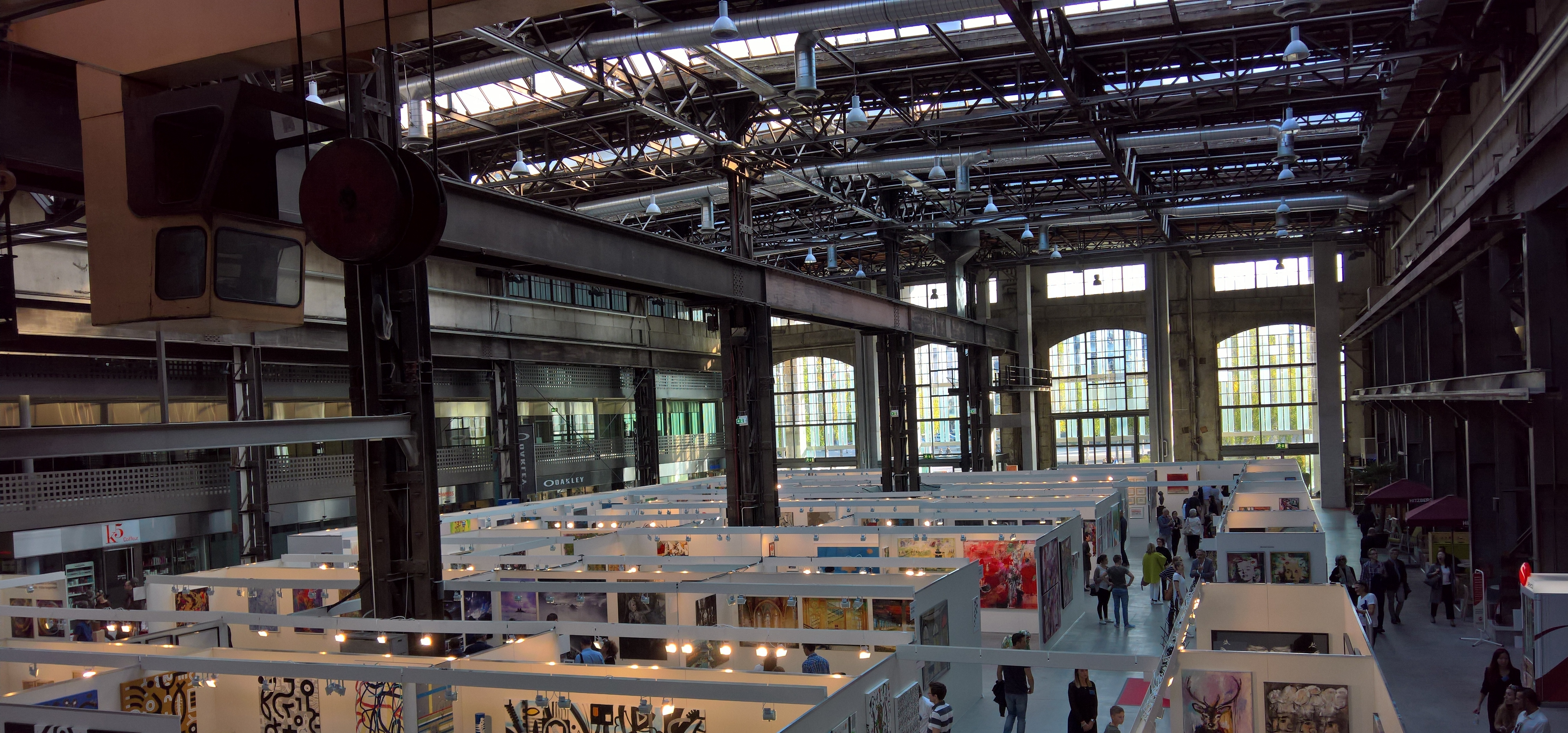 Photo du Salon Art Fair Zurich en 2017